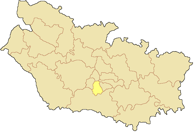 Canton d'Amiens-6 dans le département de la Somme